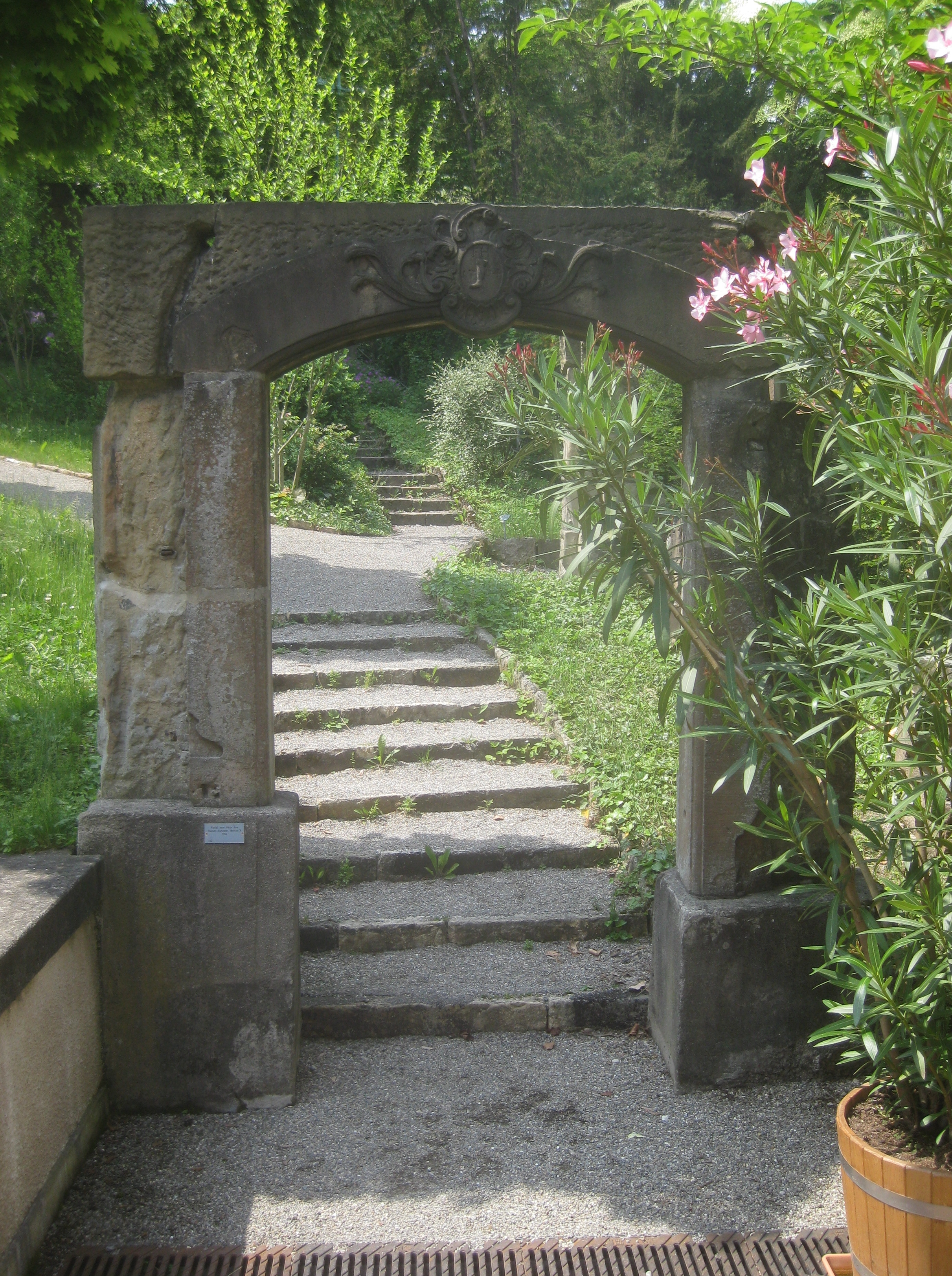 Portal vom Haus des „Russenschusters“ in der Weinstraße 3 in Stuttgart, 1764, Städtisches Lapidarium Stuttgart, Nr. 142.